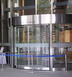 2004年4月24日、利用者:Gleamによる撮影。